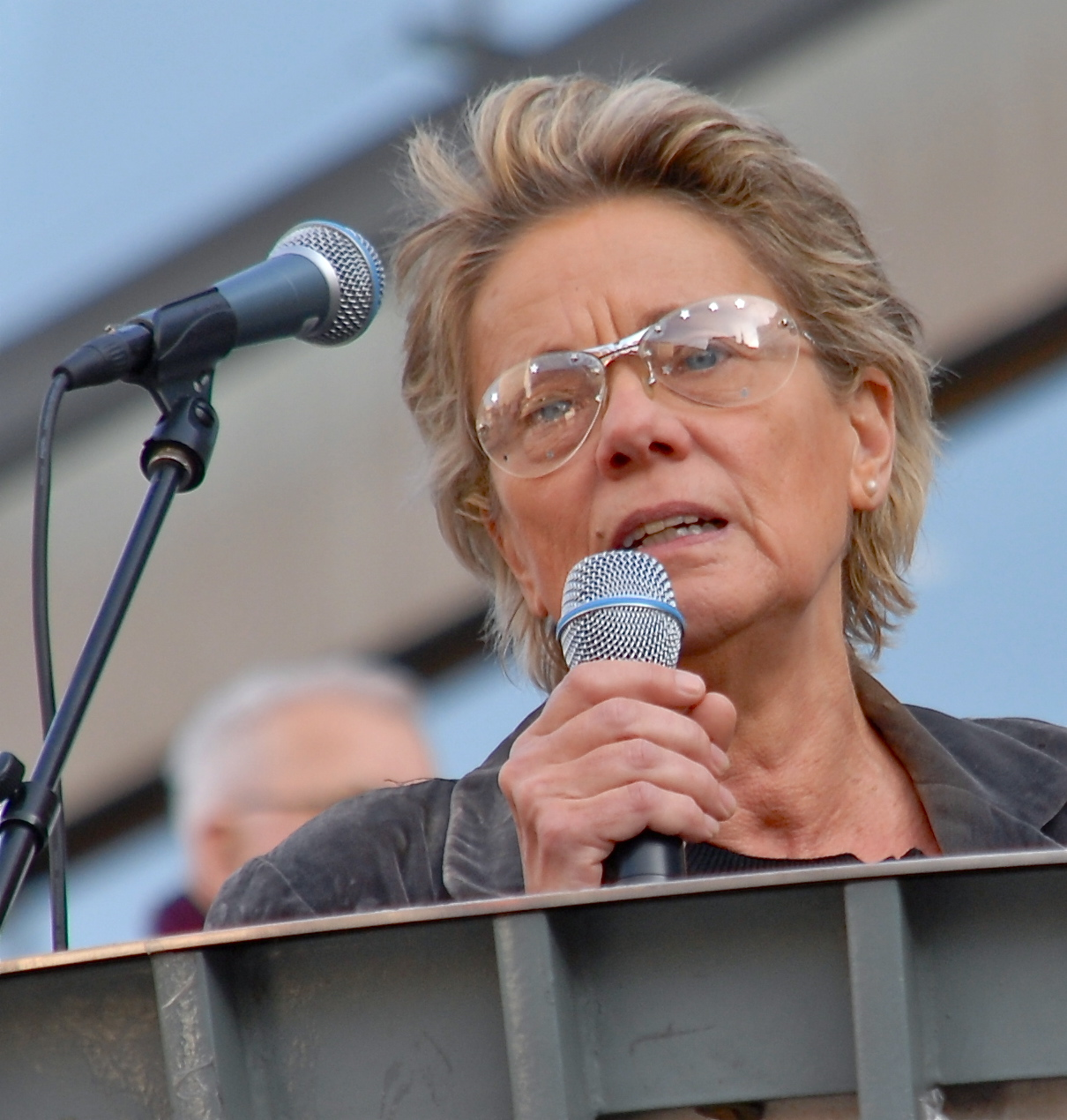 Maria-Pia Boëthius i talarstolen på Sergels torg i Stockholm den 9 oktober 2010.